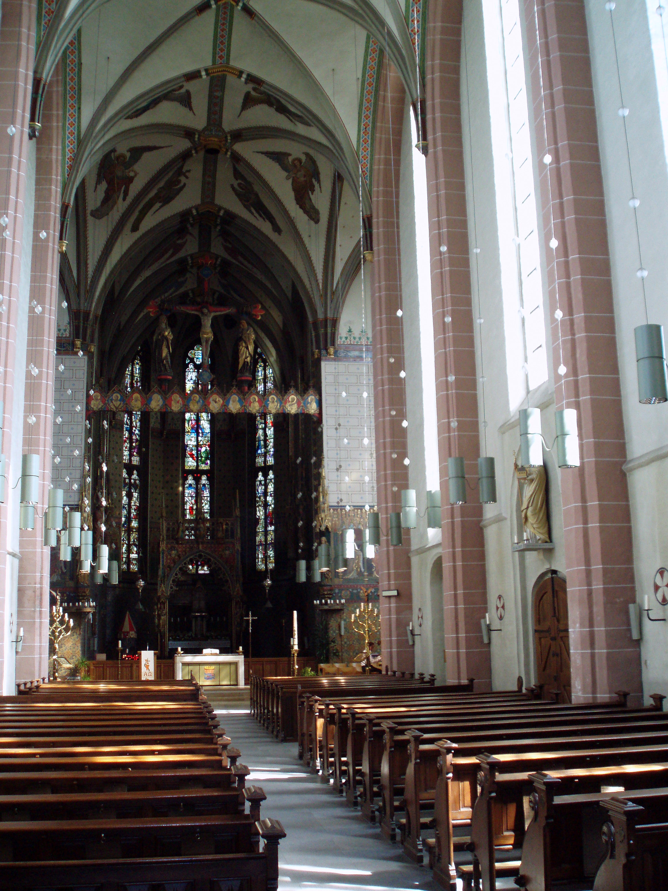 Interieur van de Basiliek van Onze-Lieve-Vrouw-Tenhemelopneming in Zwolle